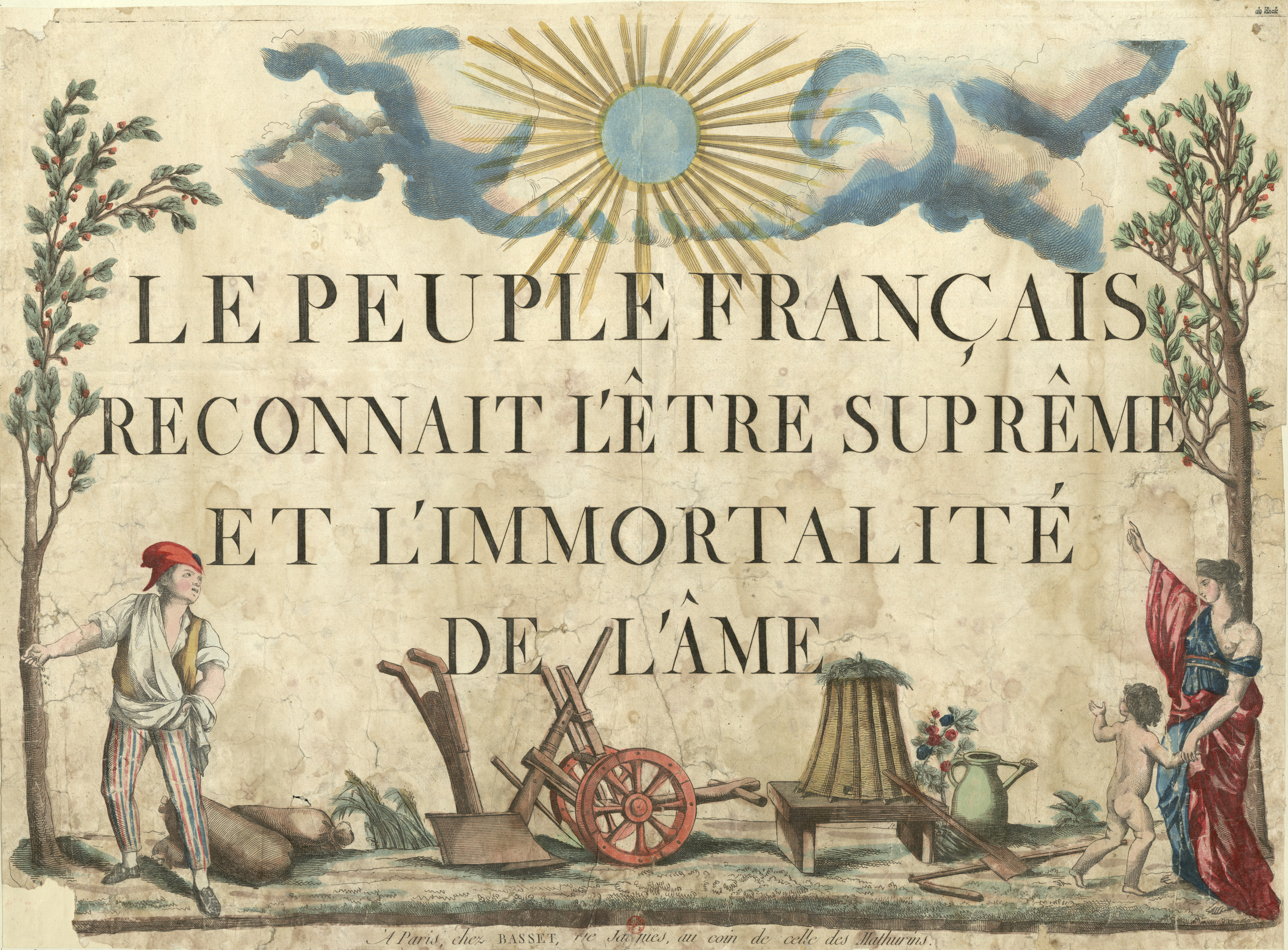 Le peuple français reconnaît l'être suprême et l'immortalité de l'âme, estampe anonyme publiée chez Basset, Paris, 1794.